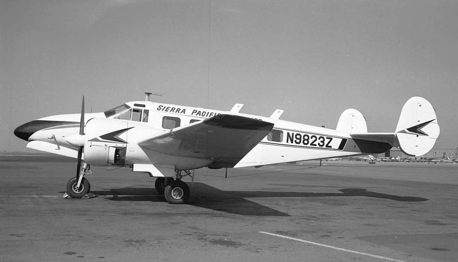 Sierra Pacific Airlines at San Jose, CA, Nov 1965. Ex C-45H c/n AF631.